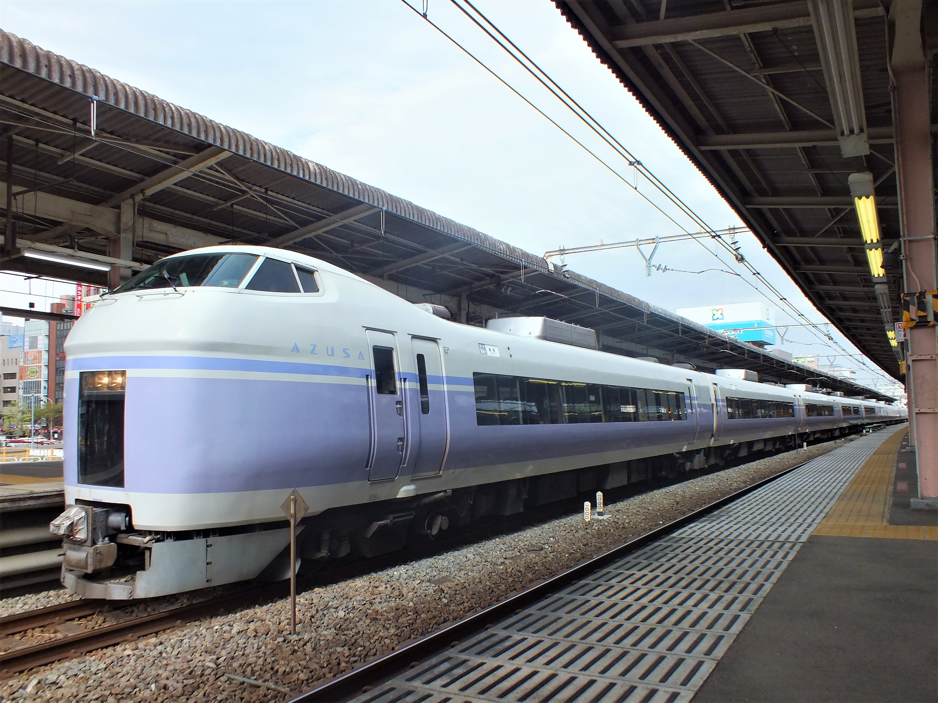 ありがとうE351系 松本〜新宿ラストランの旅 (中野駅)